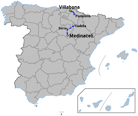 Mapa de la autovia A-15